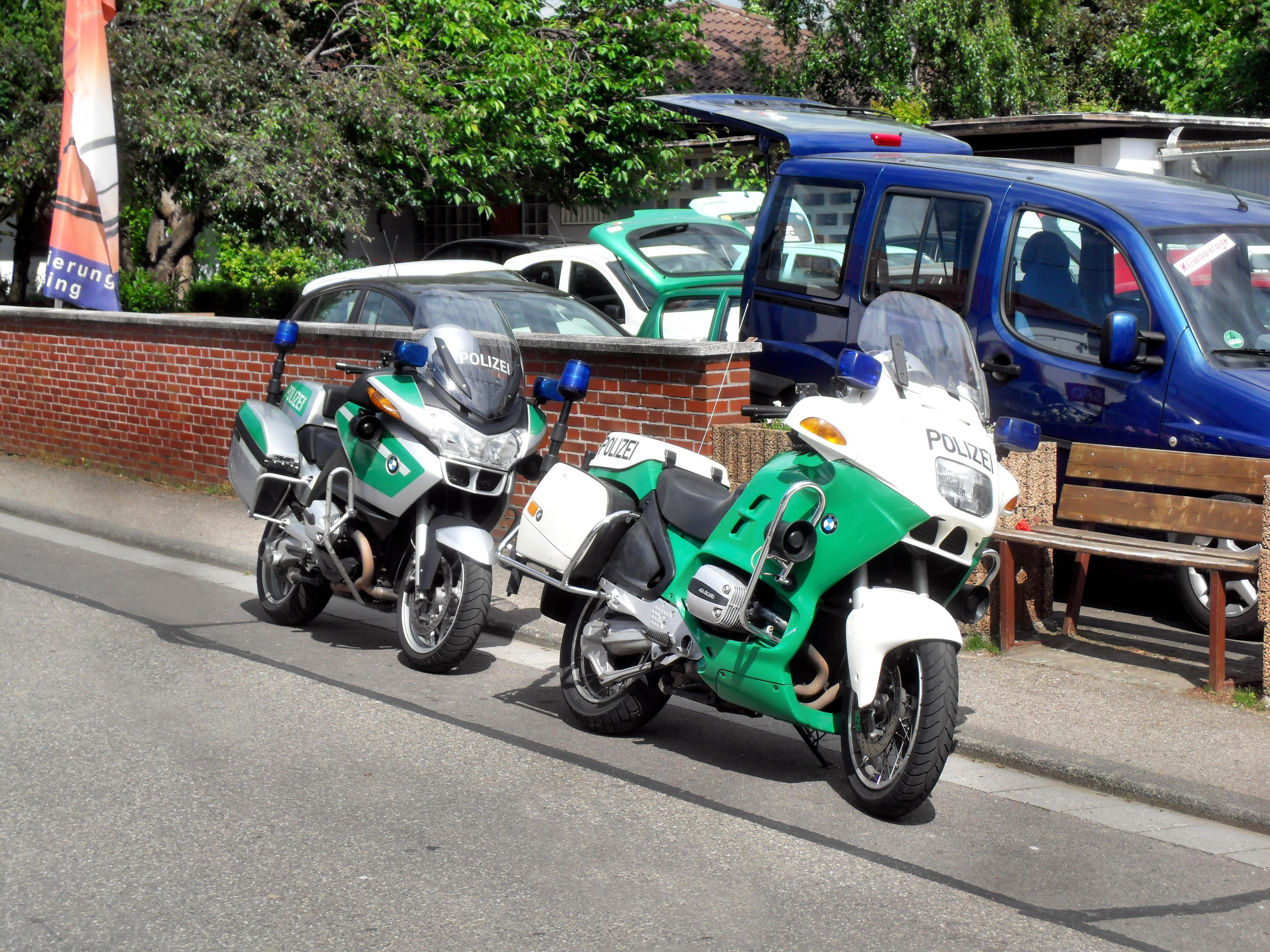 Motorräder der Polizei Rheinland-Pfalz im rheinland-pfälzischen Alsheim in Deutschland